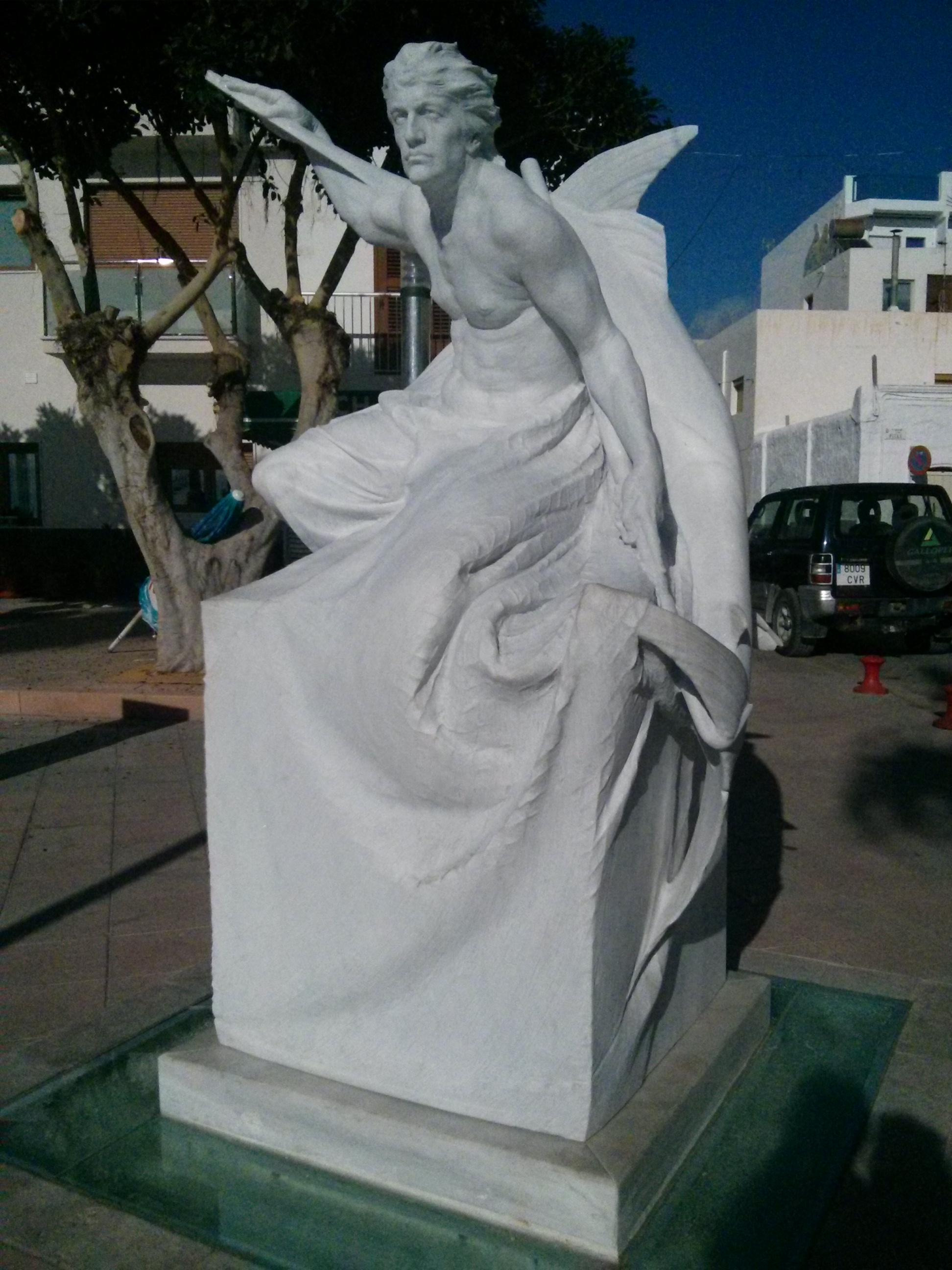 Monumento al pescador, en la localidad de Carboneras (Almería, España). Estatua de mármol blanco del escultor Roberto Manzano.